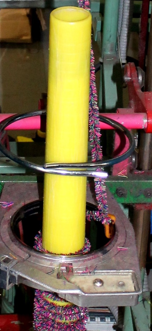 Zwirnring und Ringläufer an einer Chenillemaschine